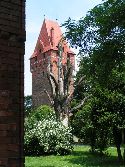 Tangermünde, Kapitulturo